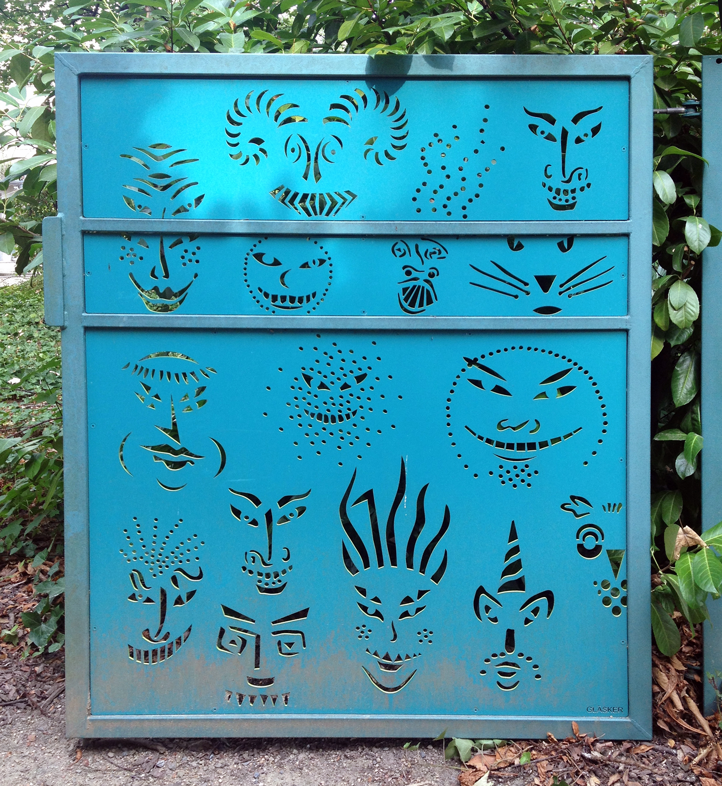 Tor der Faces Torflügel rechts, Installation am Parktor zur Gartenvitrine im Malkastenpark, von Horst Gläsker, 2009